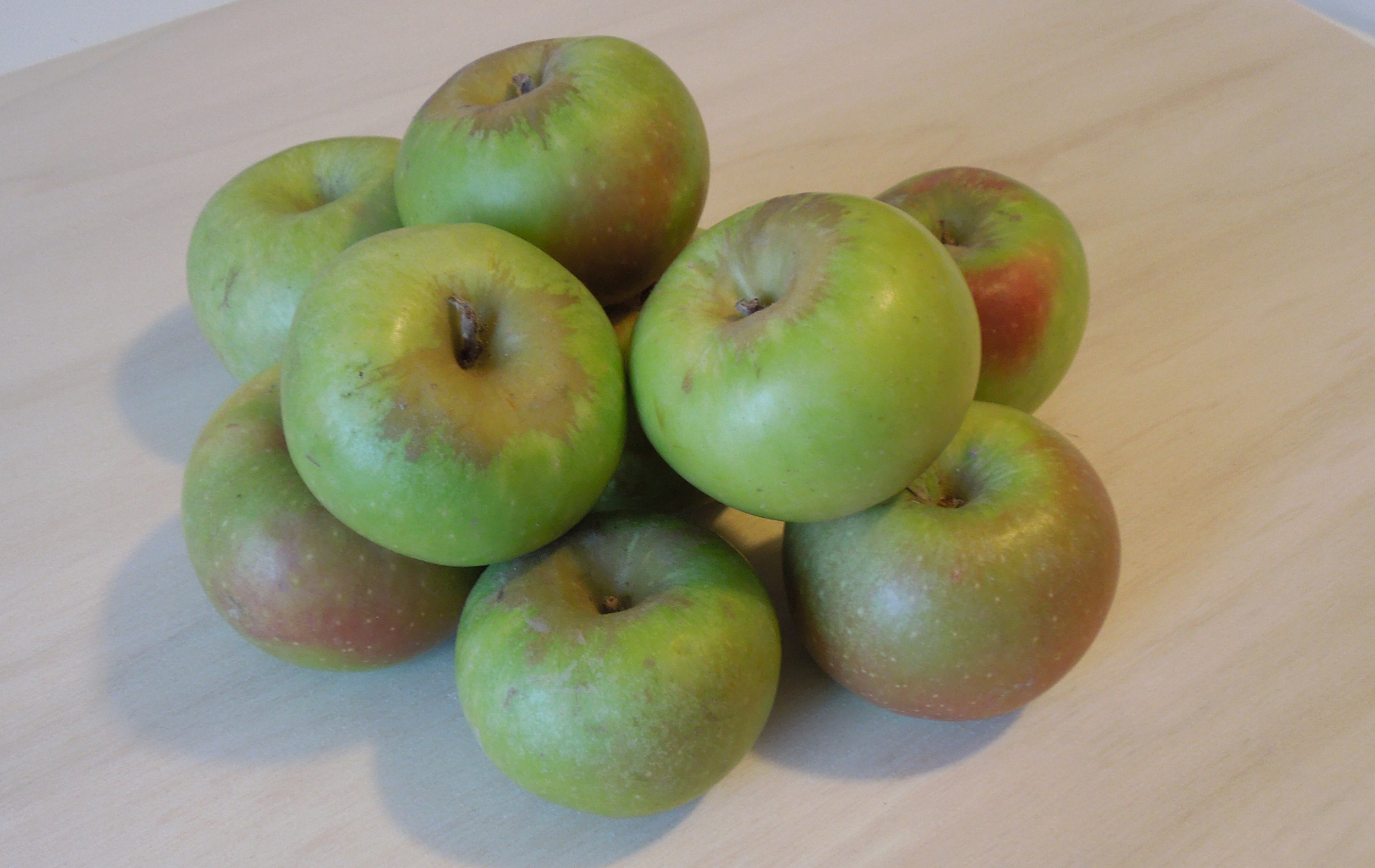 Mele Rosa dei Monti Sibillini, raccolte nel territorio del Comune di Arquata del Tronto in provincia di Ascoli Piceno.